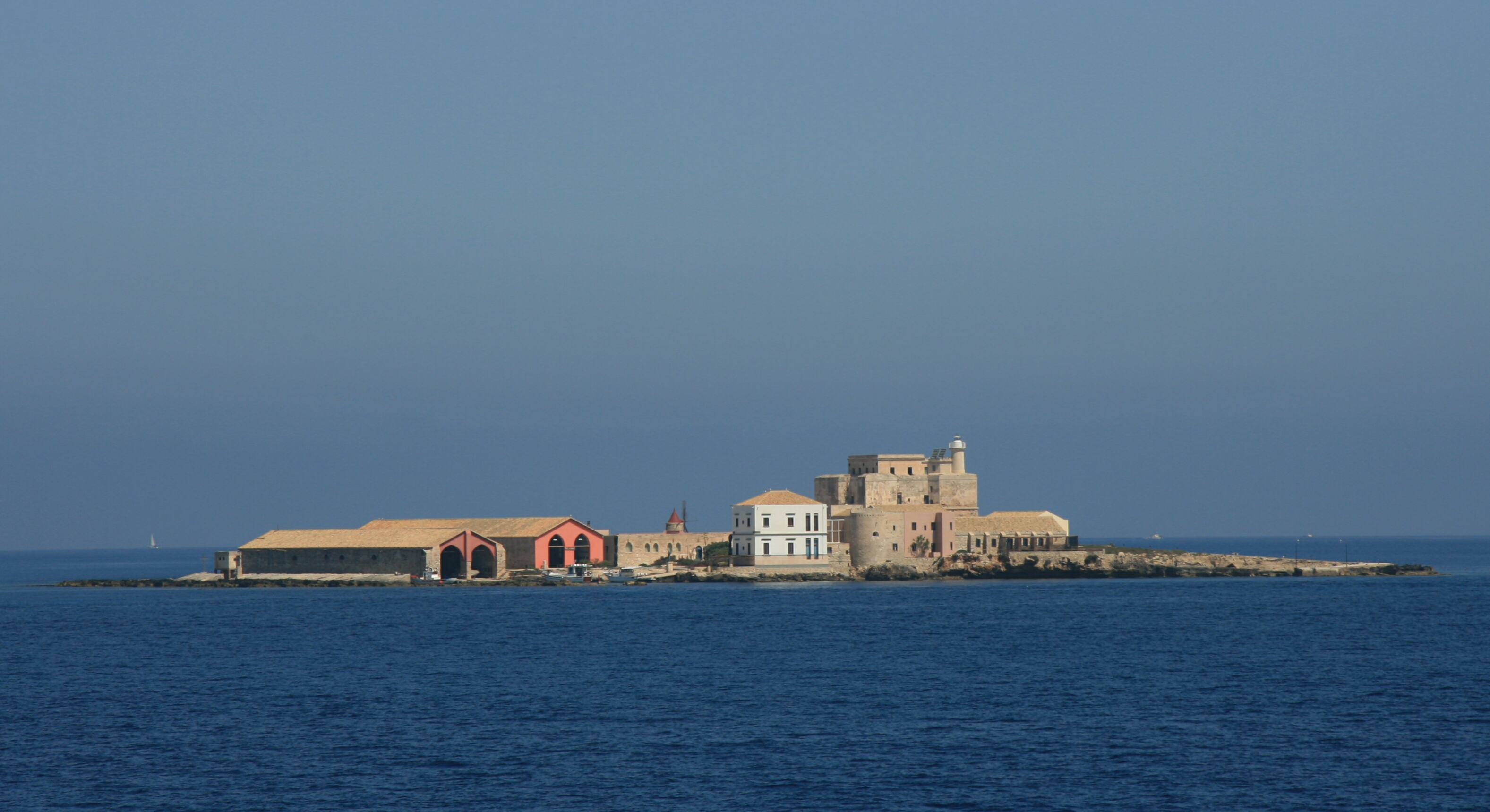 Isola Formica, con la tonnara. Isole Egadi, tra Trapani e Favignana, Sicily